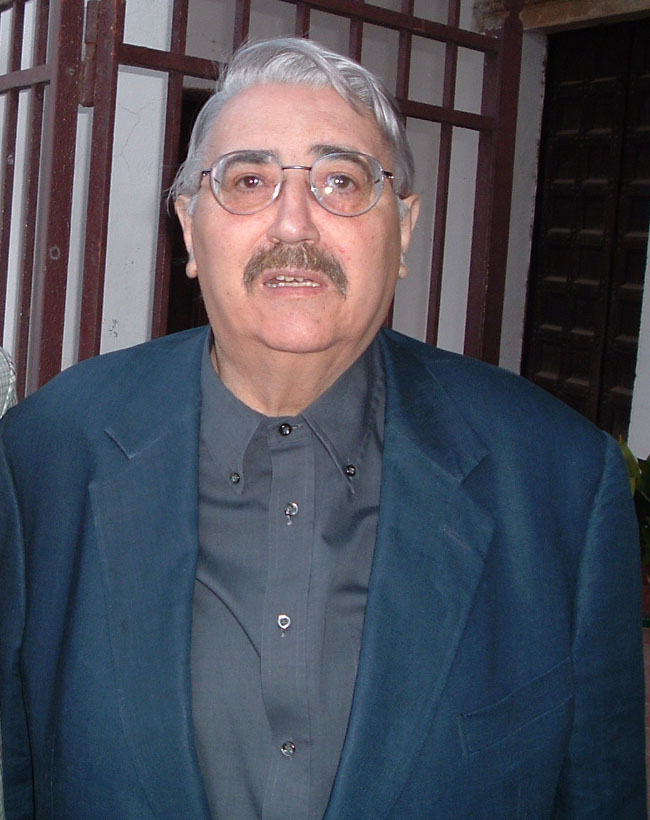 Giorgio Tosatti. Foto personale. Scala (SA)